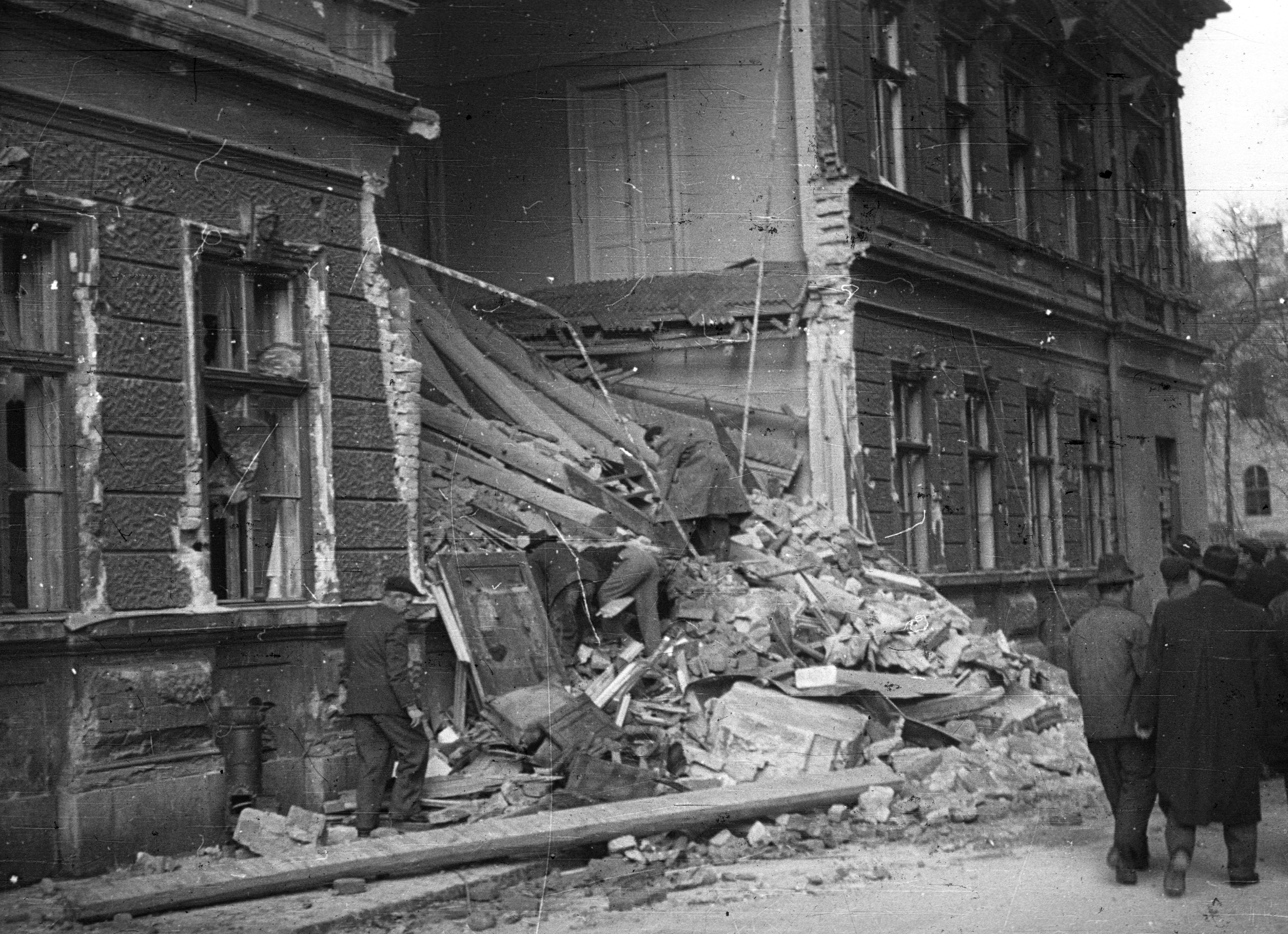 Thaly Kálmán utca, az Üllői út 87. Thaly Kálmán utca felé eső homlokzata. Location: Hungary, Budapest IX. Tags: war damage, Budapest, revolution Title: Thaly Kálmán utca, az Üllői út 87. Thaly Kálmán utca felé eső homlokzata.